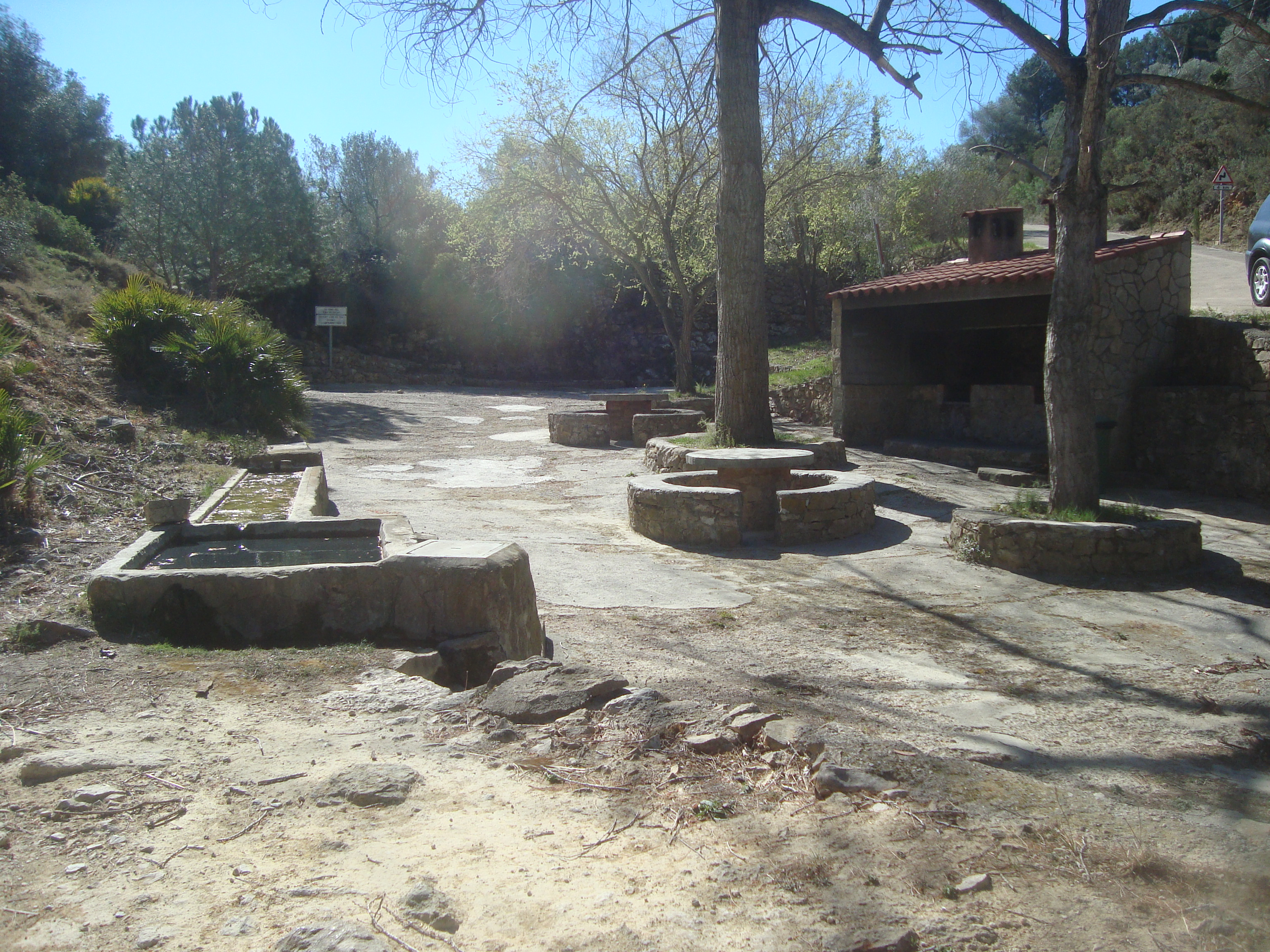 Font del Mas de Calaf (Vilanova d'Alcolea) 05.132-018.